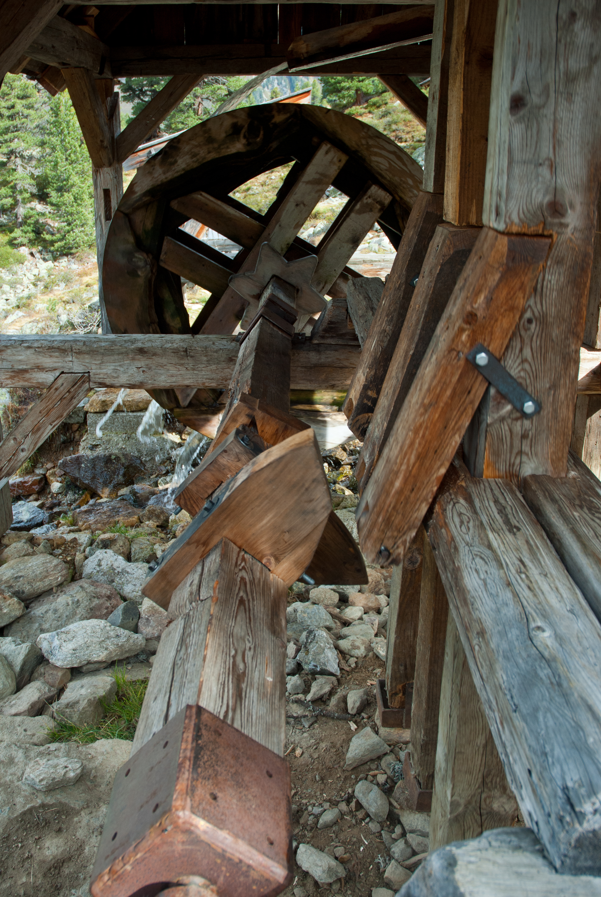 Pochwerk im Wörgetal beim Pochersee (Puchersee)